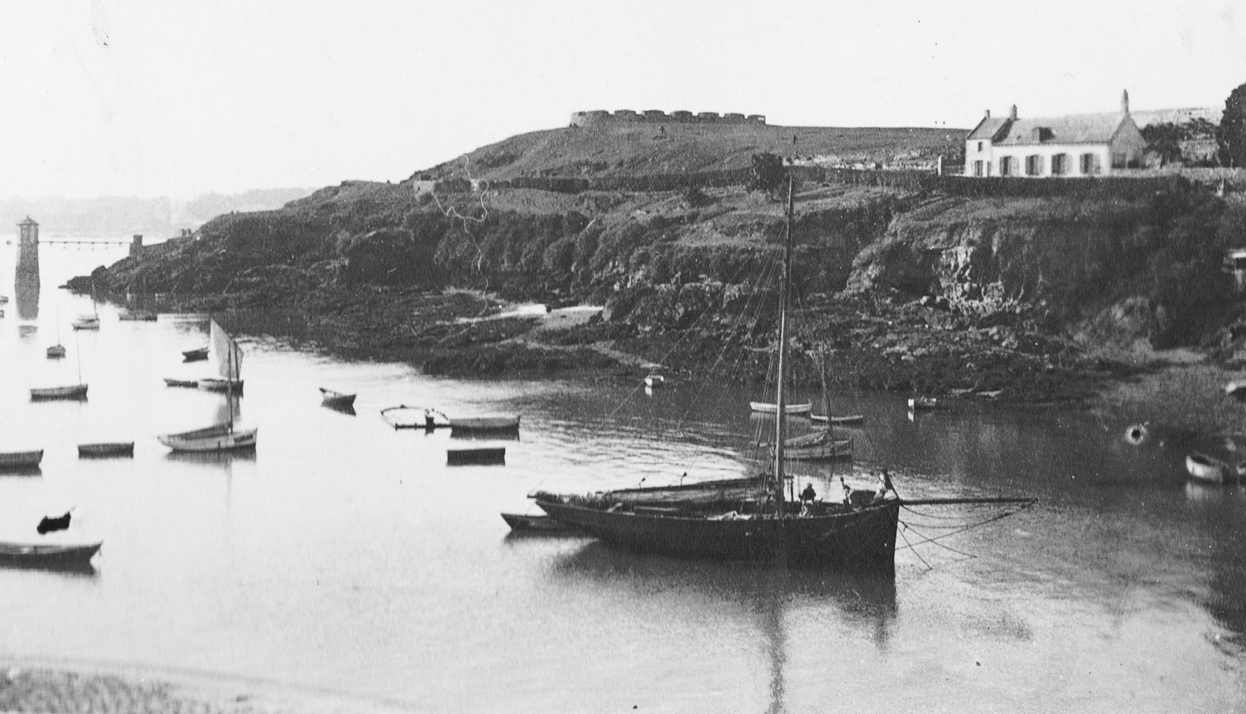 La cité d'Aleth, en Saint-Servan (Saint-Malo) et la maison de l'académicien Louis Duchesne (1843-1922), isolée et blanche, carte postale ancienne, début XXème siècle. Collection Marie-Anne Miniac, Rennes, France.